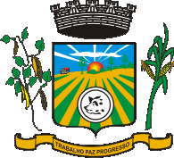 Brasão de Armas do município paranaense de Verê, Brasil.